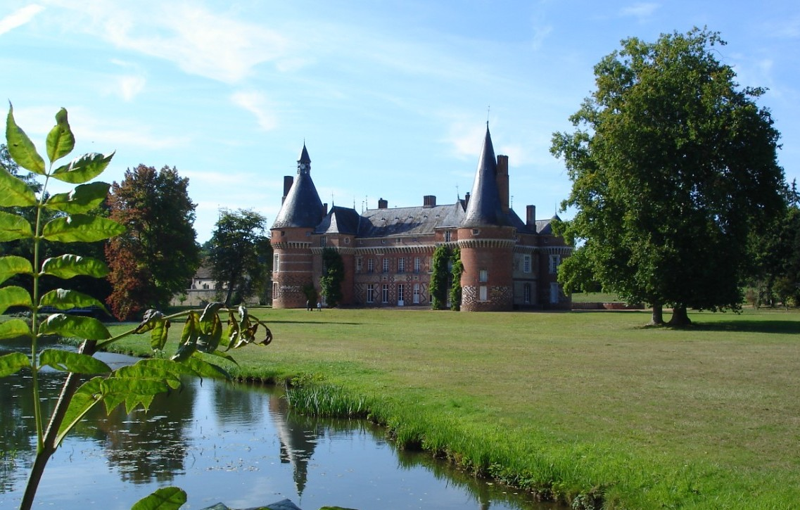 vue du chateau de Maillebois, prise de vue depuis l'intérieur du parc